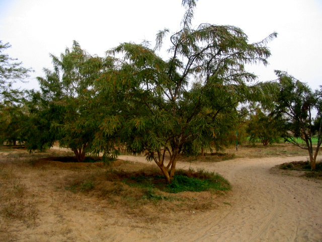 l'amla; amla tree, Indian gooseberry.